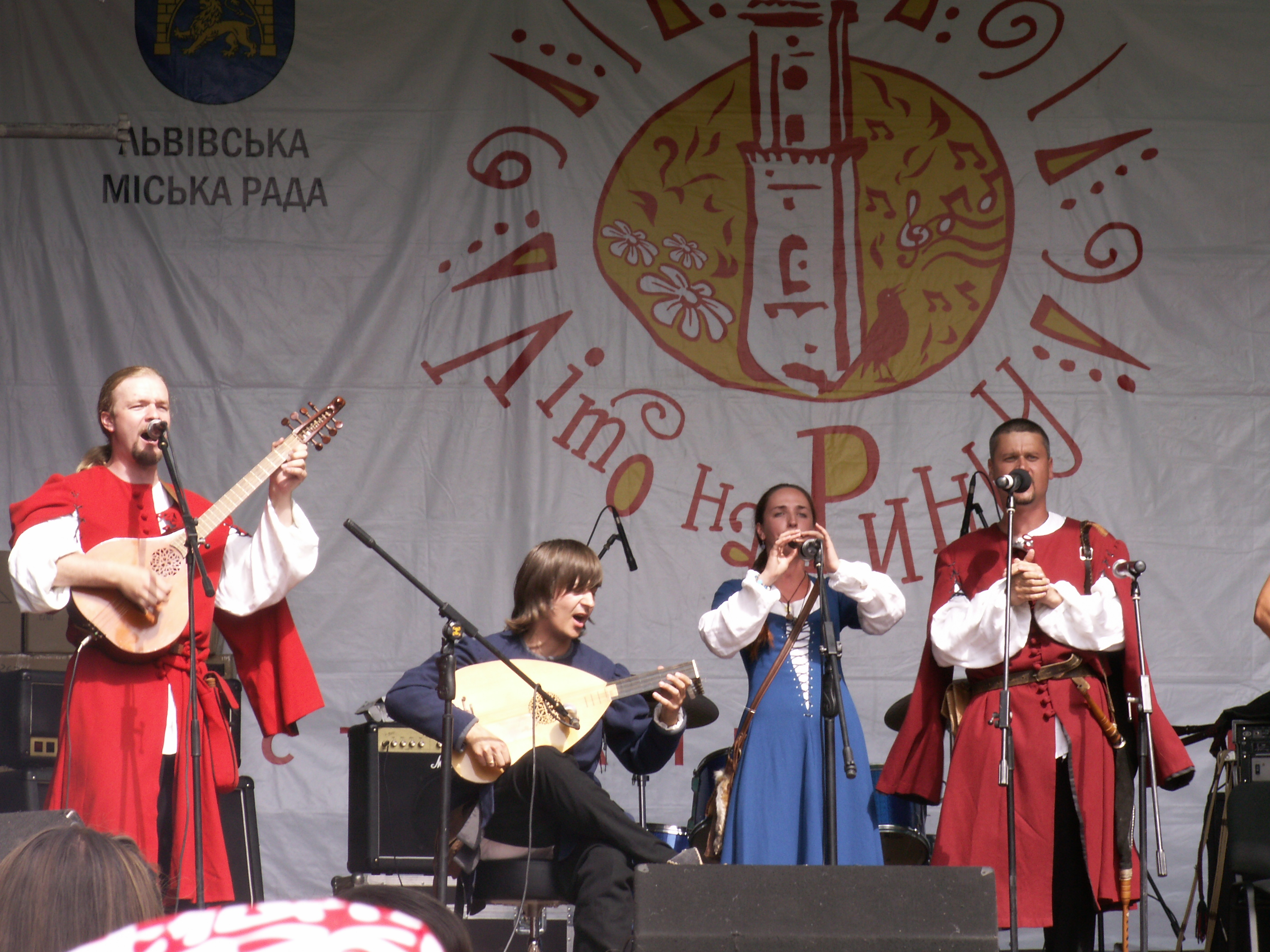 Беларуская (тарашкевіца): Выступ "Старога Ольсы" на фэстывалі "BeFree-2008", Львоў. Уласнае фота.